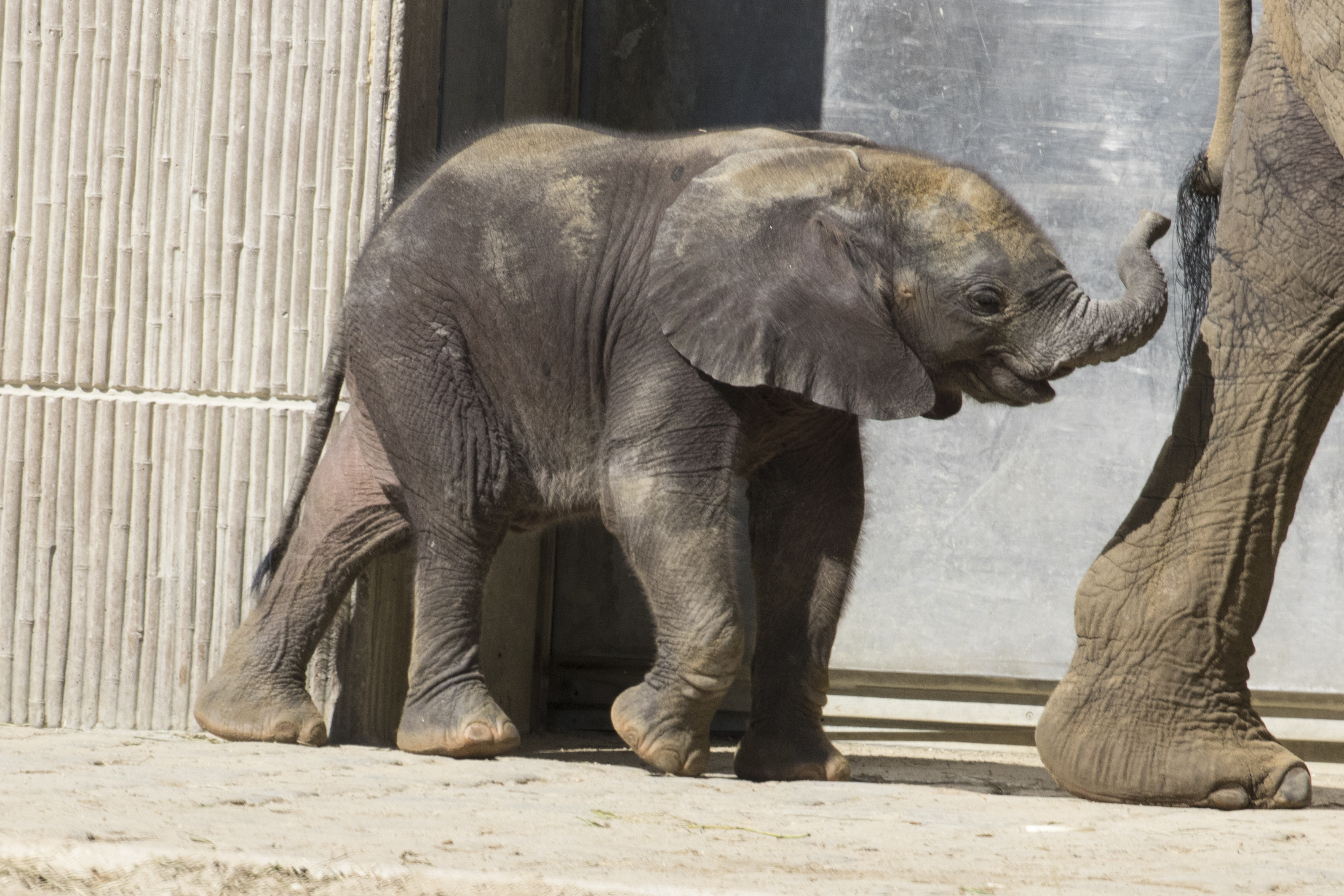 Elefantenweibchen Kibali im Tiergarten Schönbrunn (Wien, Österreich)